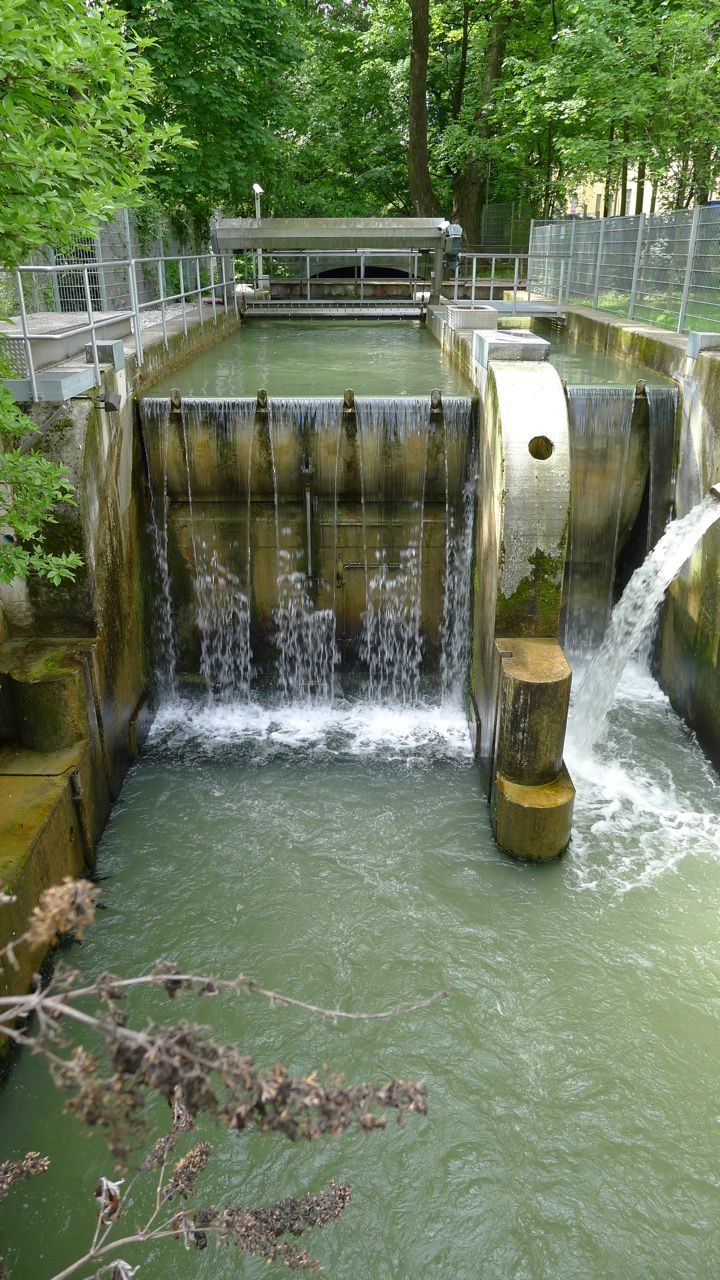 Stadtbach am Muffatwerk - besichtigt auf der Radtour zu den Münchner Stadtbächen am 17.5.12, Wikipedia-Stammtisch München